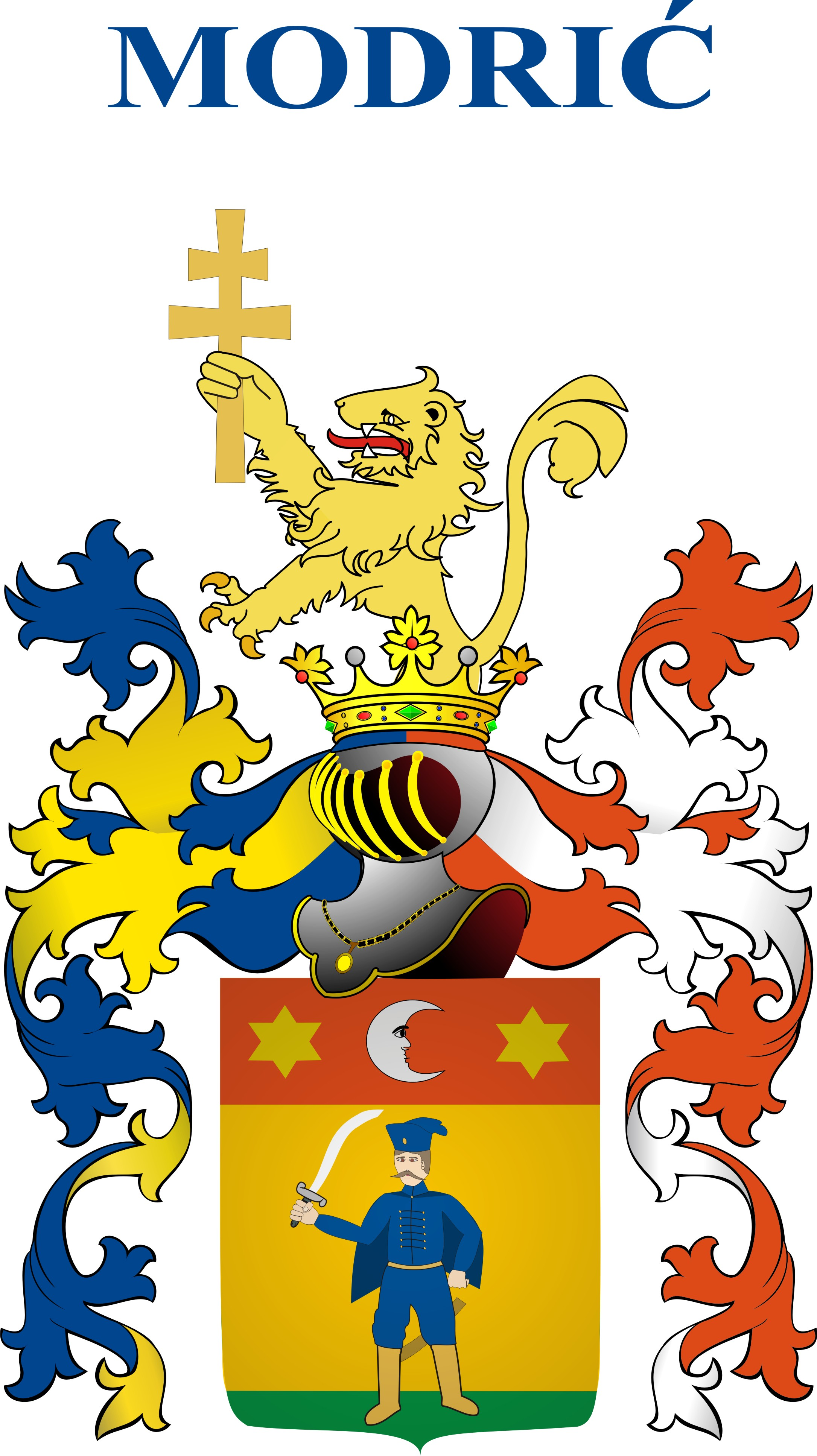 Grb obitelji Modrić po grbovnici iz 1791. godine